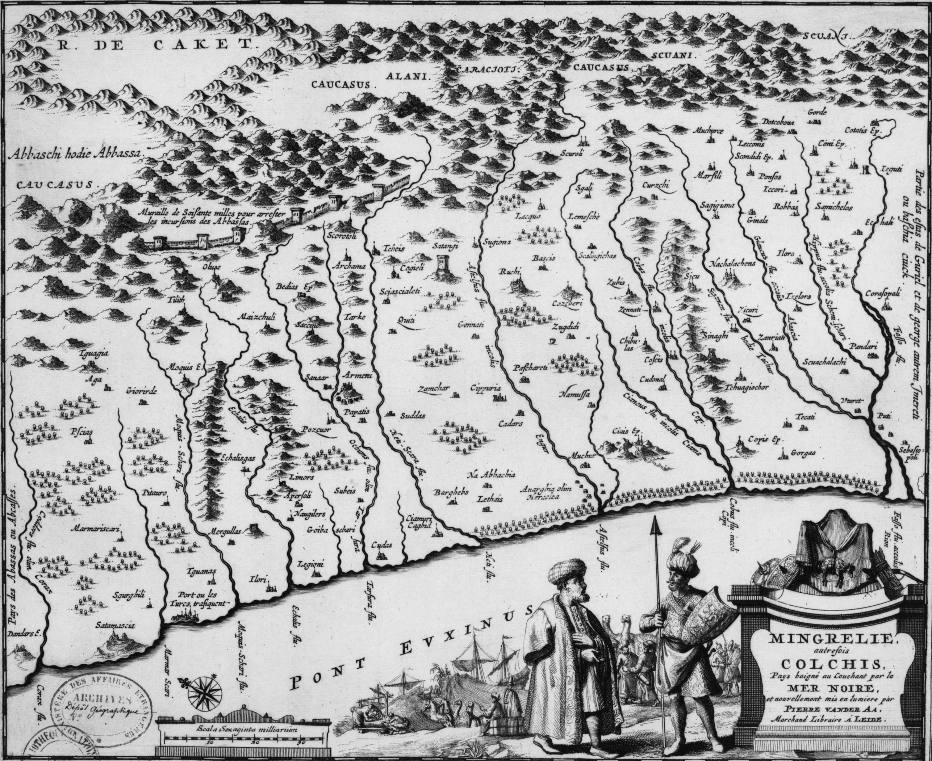 Mingrélie, autrefois Colchis, pays baigné au couchant par la Mer noire, et nouvellement mis en lumière par Pierre Vander Aa.